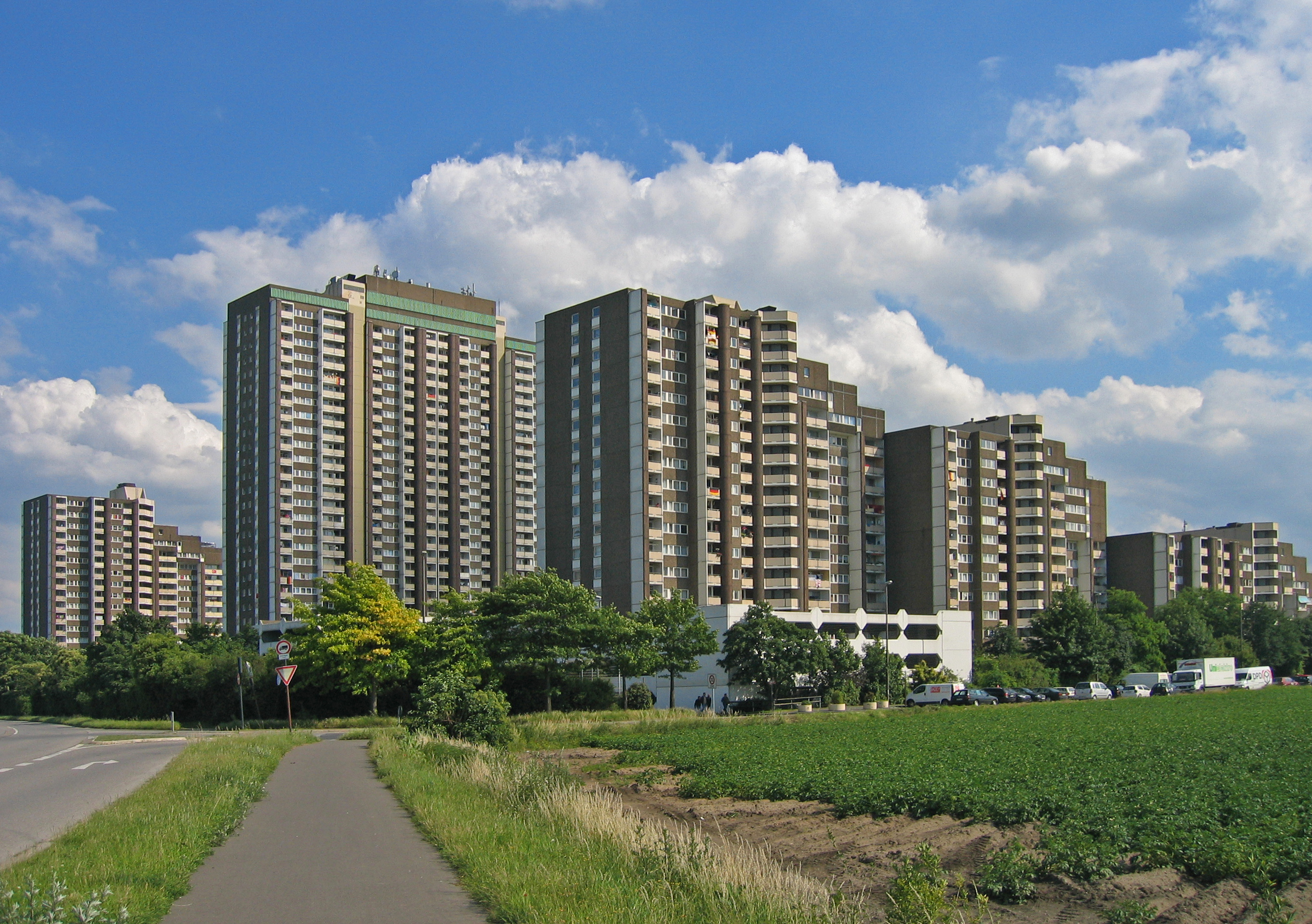 Die Hochhaussiedlung Am Kölnberg in Köln-Meschenich